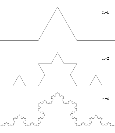 Построение кривой Коха. Кривая Коха.